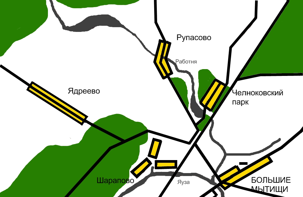 Карта прохождения реки Работни по г. Мытищи